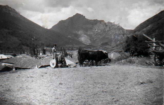 Fotografía antigua de vecinos de Cofiñal Trillando en las "Heras del Barrio"